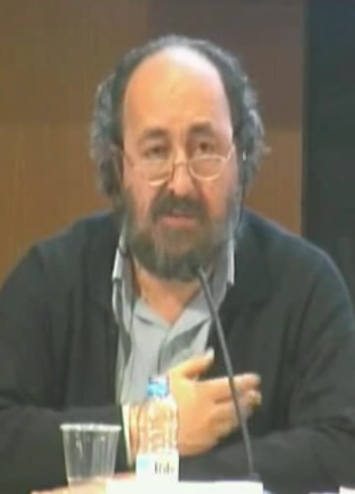 Conferencia de Albert Rossich (febrero de 2014).